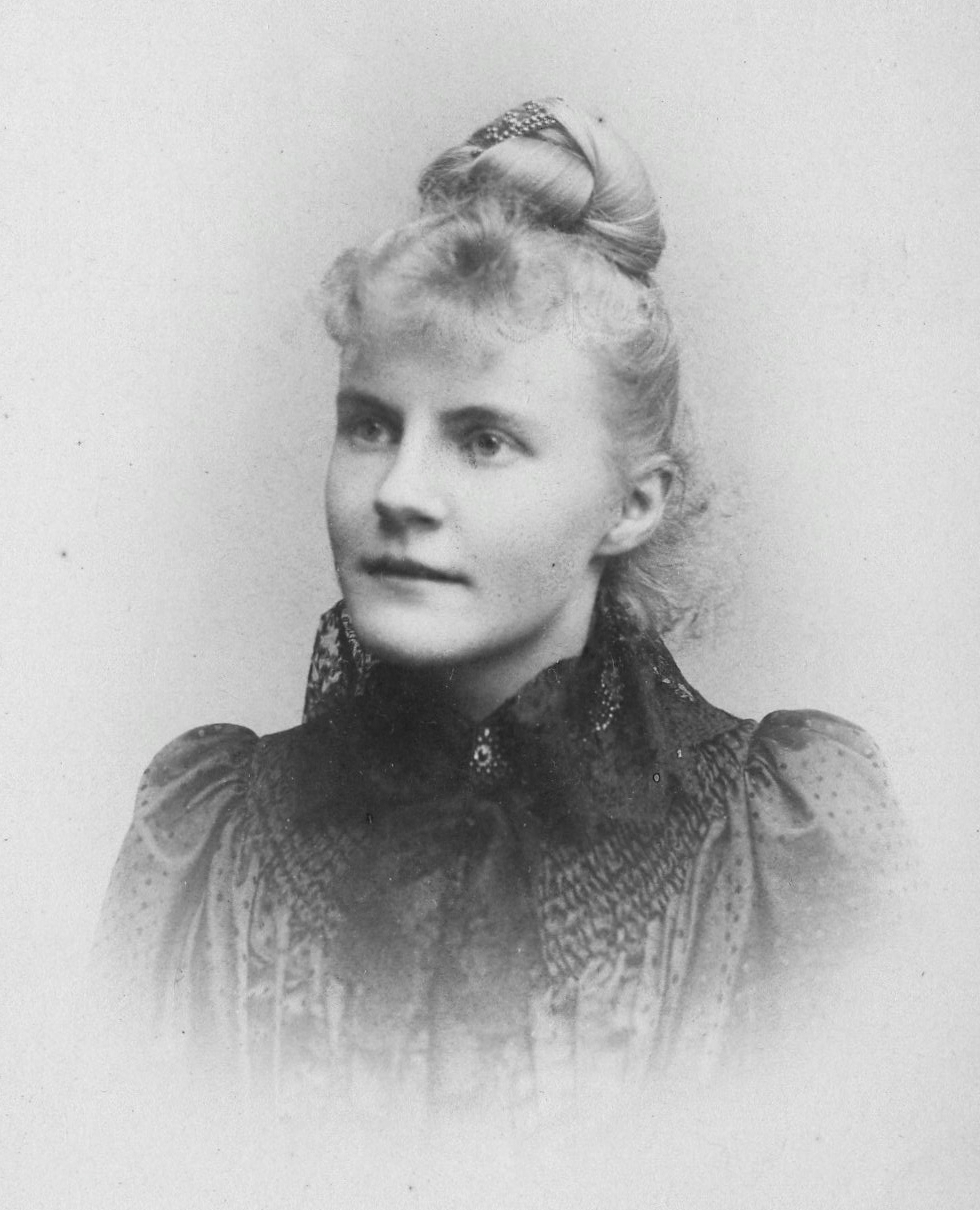 Dora Leist geb. Wagner (1871–1944), Gattin des Rechtswissenschaftlers Gerhard Alexander Leist (1862–1918)